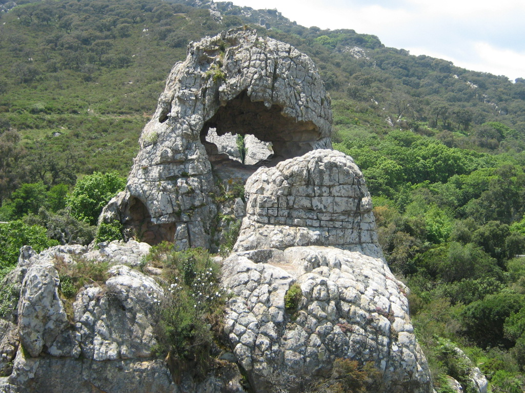 Parque natural de Los Alcornocales This is a photography of a Special Area of Conservation in Spain with the ID: ES0000049. Natura2000 entry, EEA entry